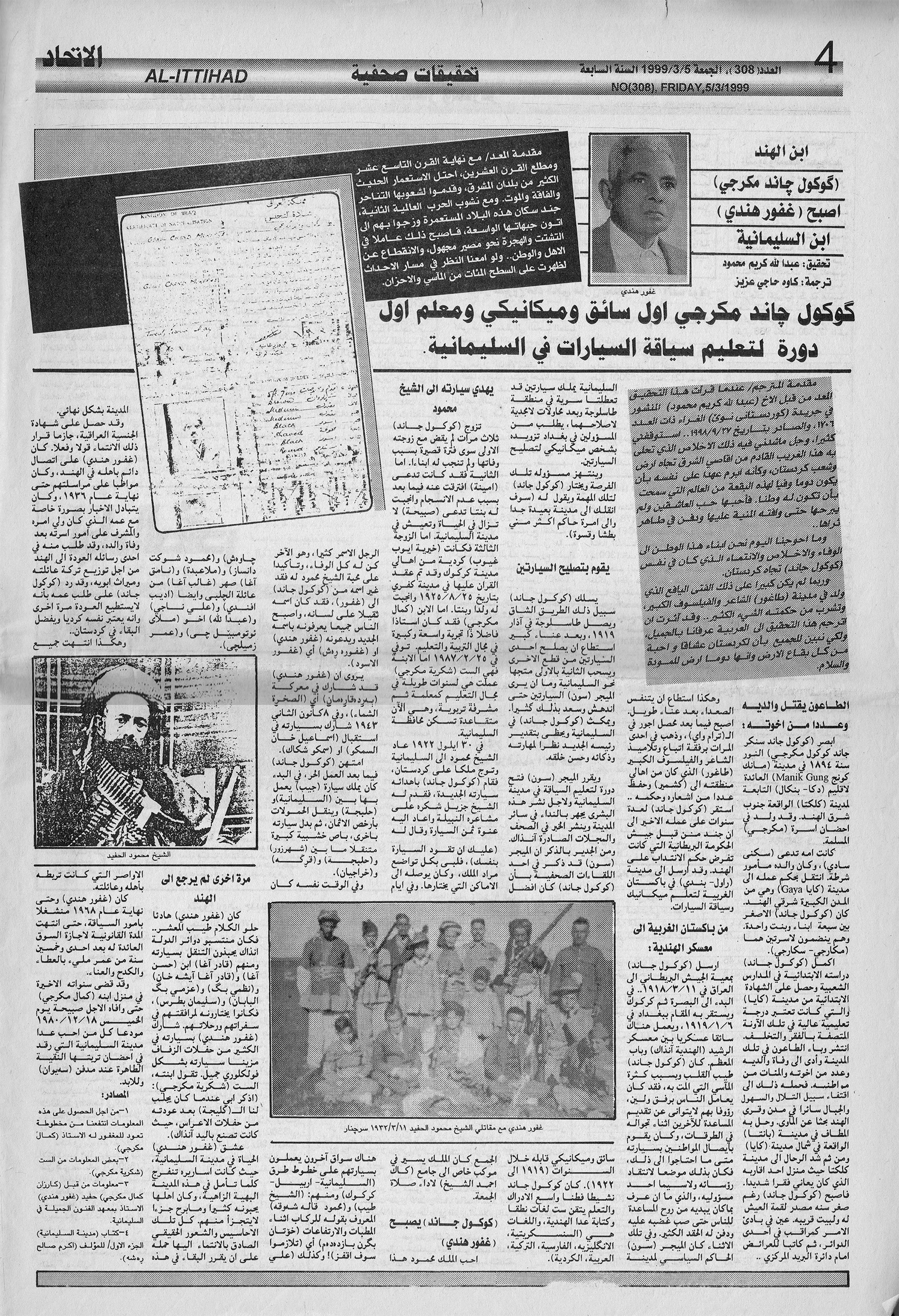 کوردی: ژمارە 308ی ڕۆژنامەی اتحاد. چیرۆکی گۆگۆل جاند مکورجی